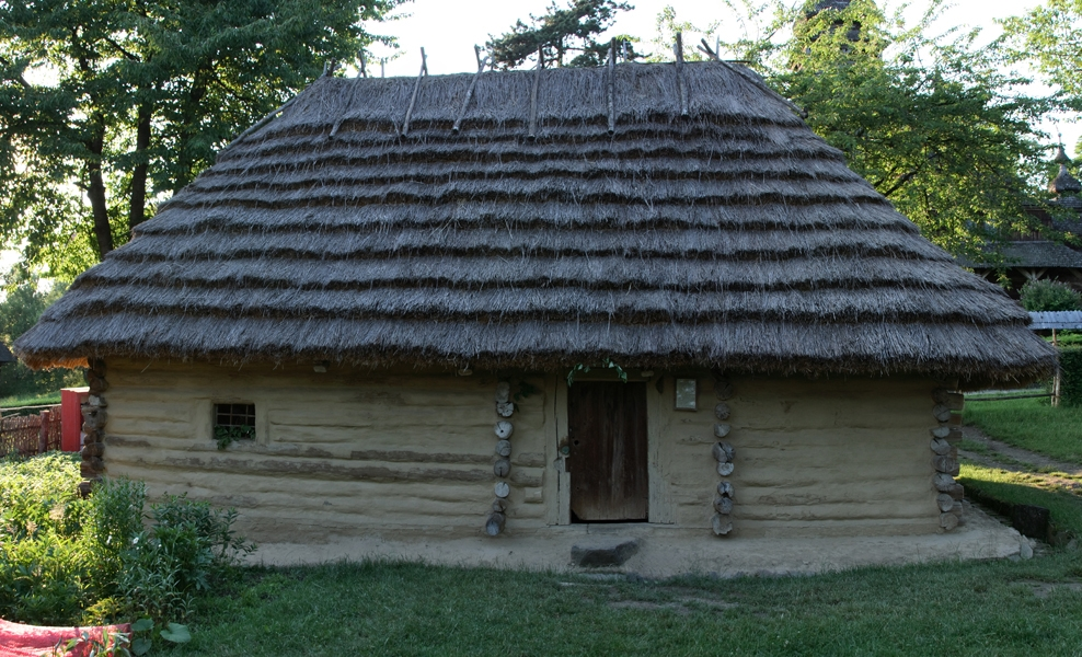 Дом из села Тибава Свалявского района. В Ужгородском скансене.